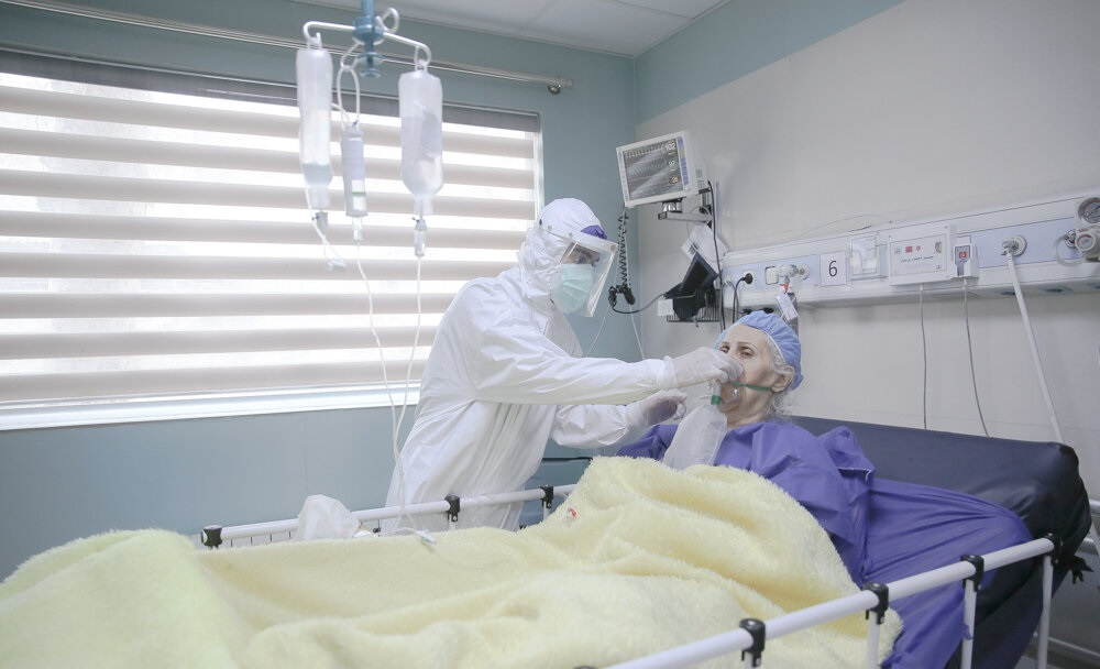 بخش ویژه کرونا در بیمارستان هاجر